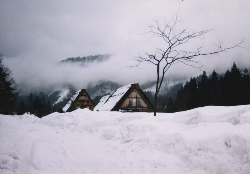 Gassho Syuraku in Shirakawagou,Gifu Pref.